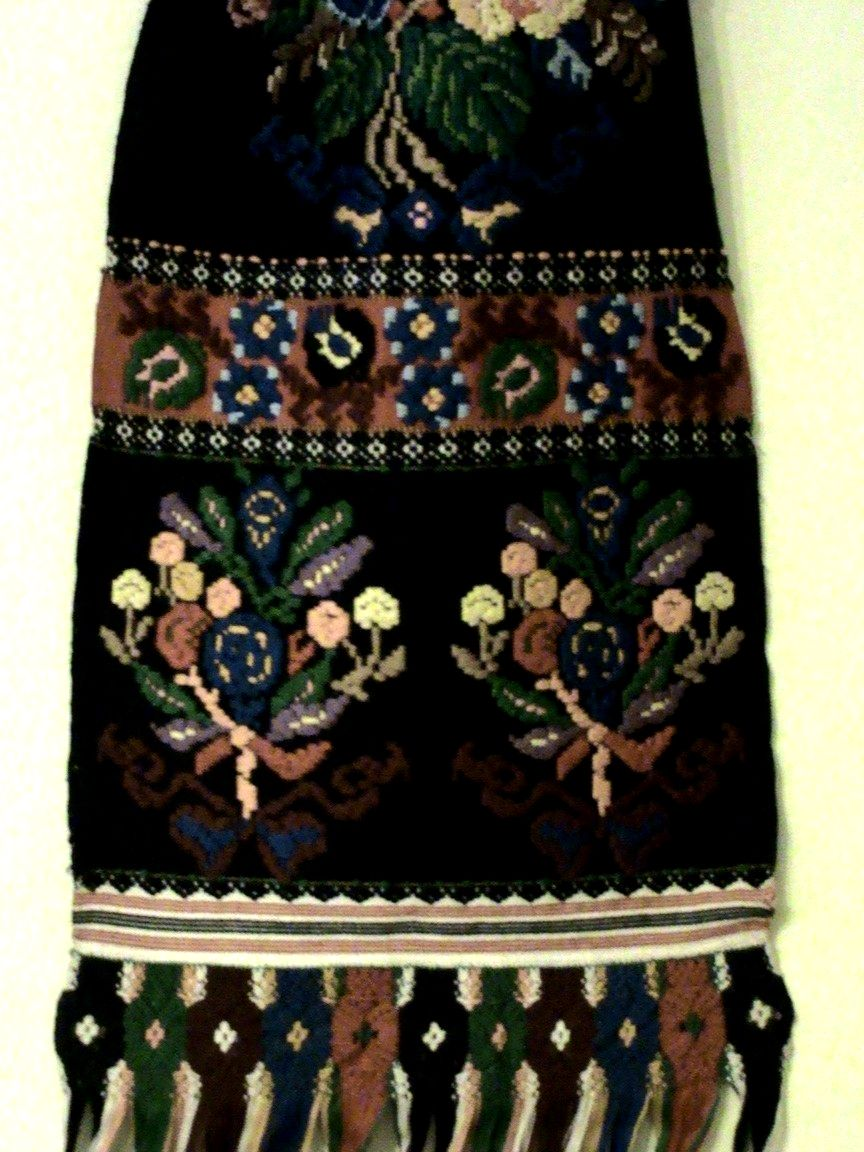 Chindeu tradiţional din Racoviţa, Sibiu.